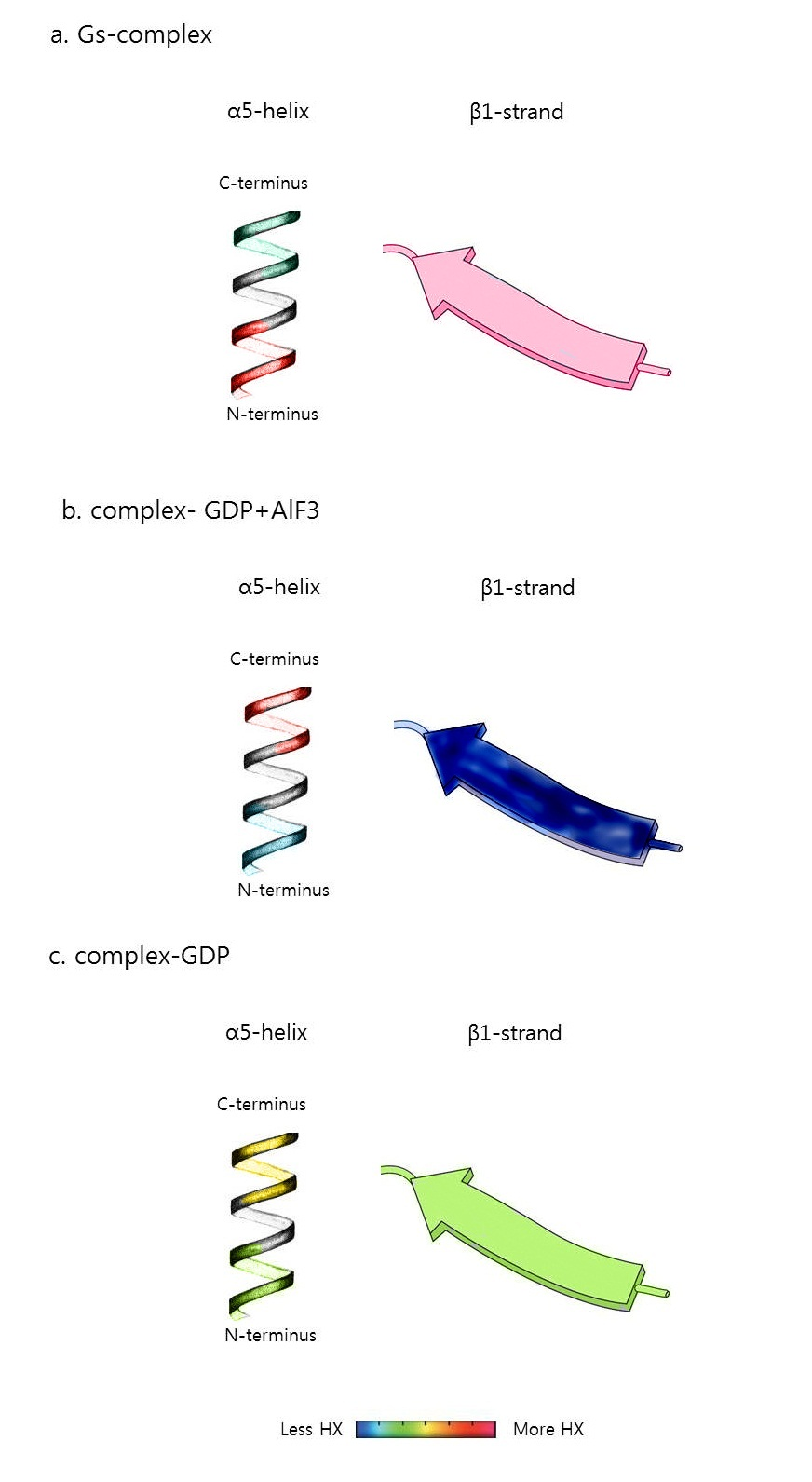 DXMS분석법을 이용한 G protein변화